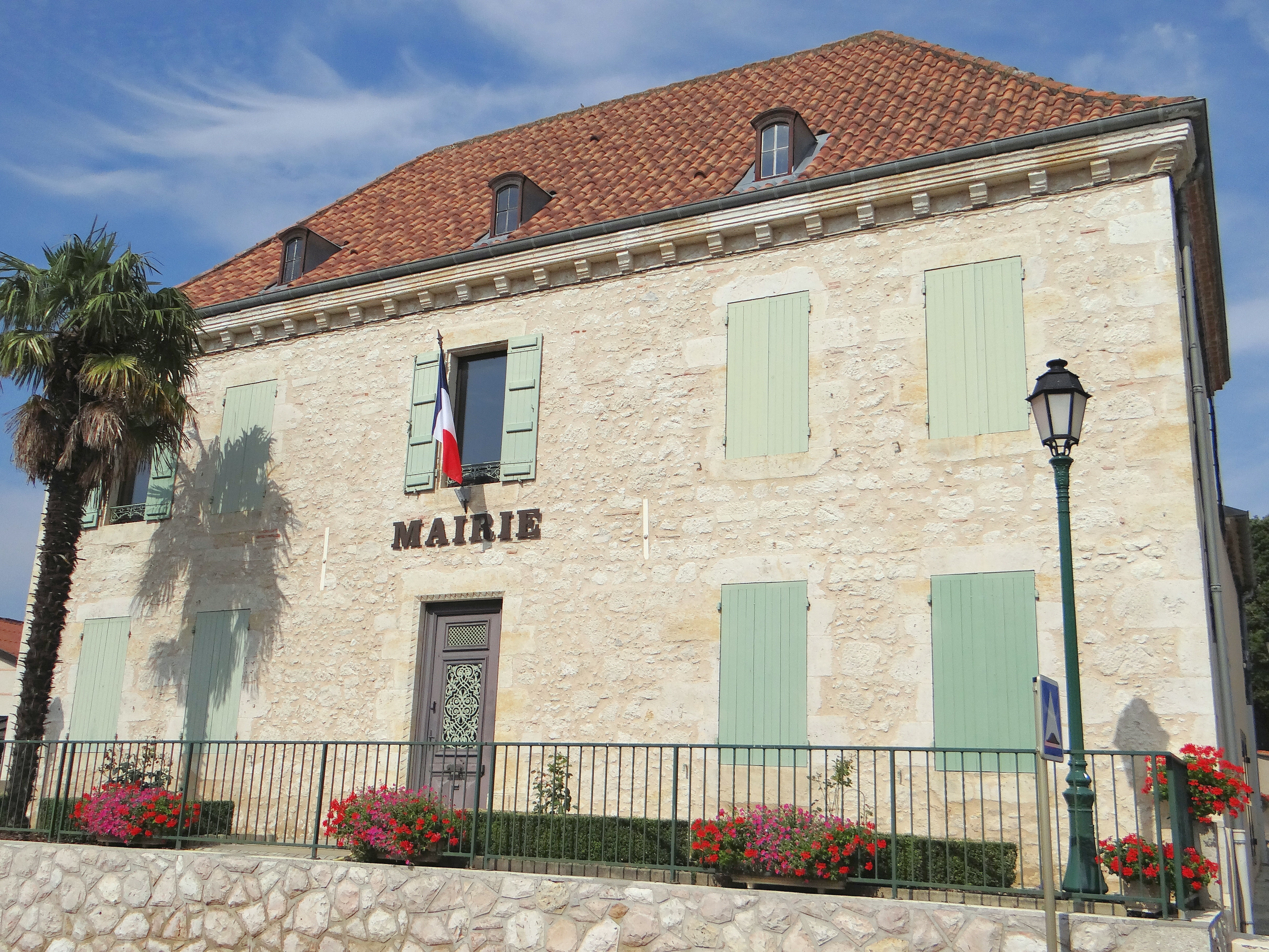 Sistels - Mairie